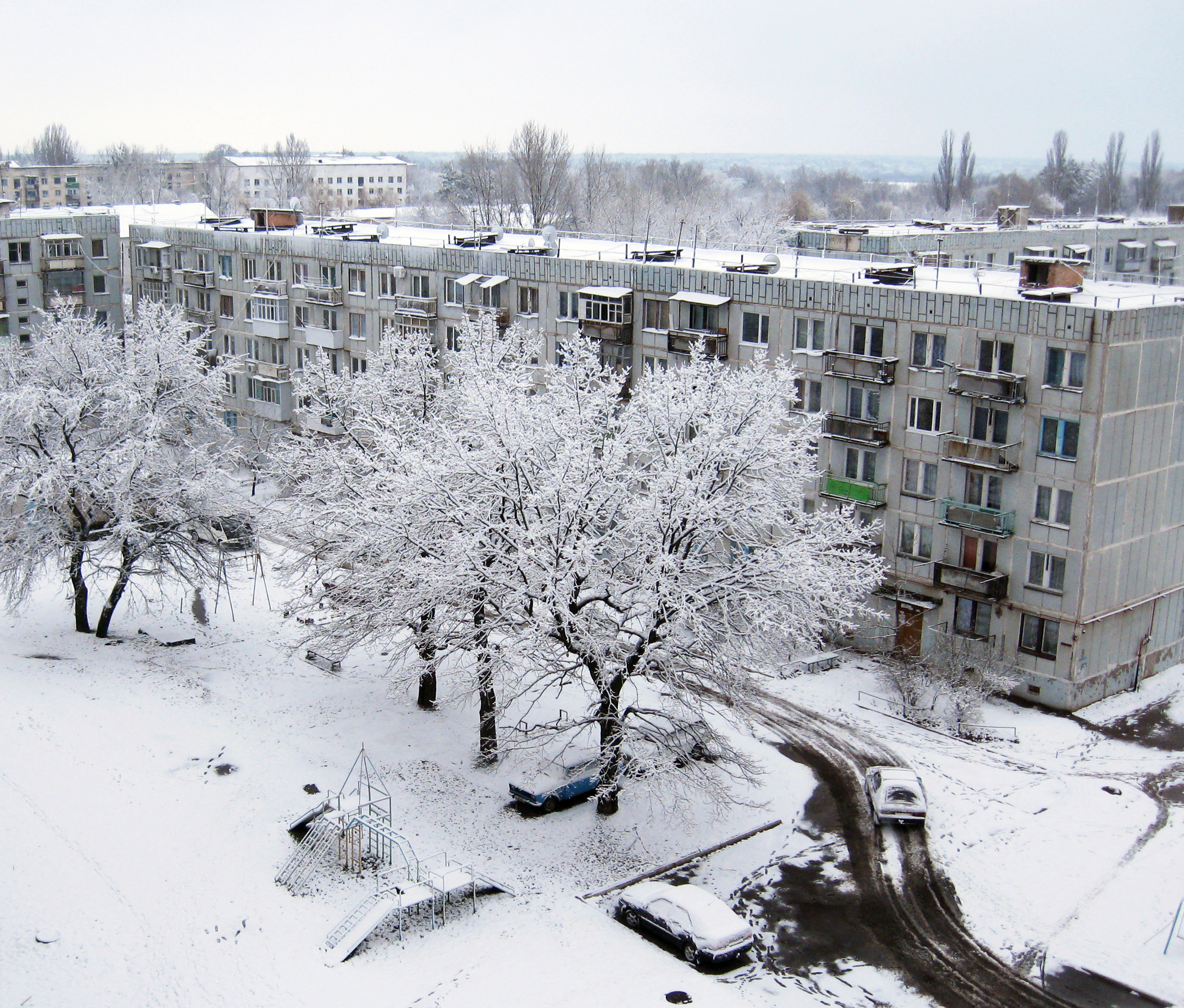 пгт Черкасское зимой